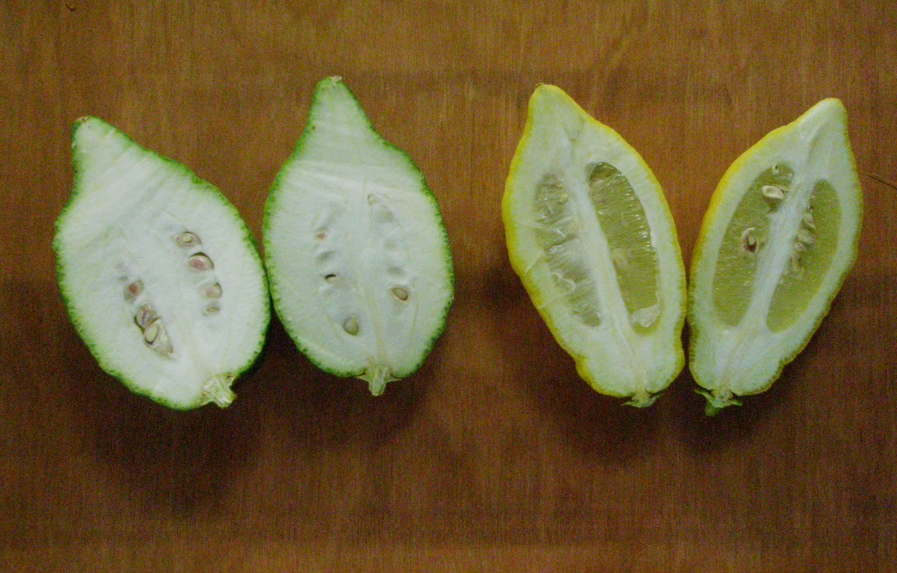 שני אתרוגים חתוכים באמצעם. הימני- אתרוג "אשכנזי" מזן "חזון איש", והשמאלי- אתרוג תימני. ניתן לראות כי בימני יש בקבוקוני מיץ, ובשמאלי אין.